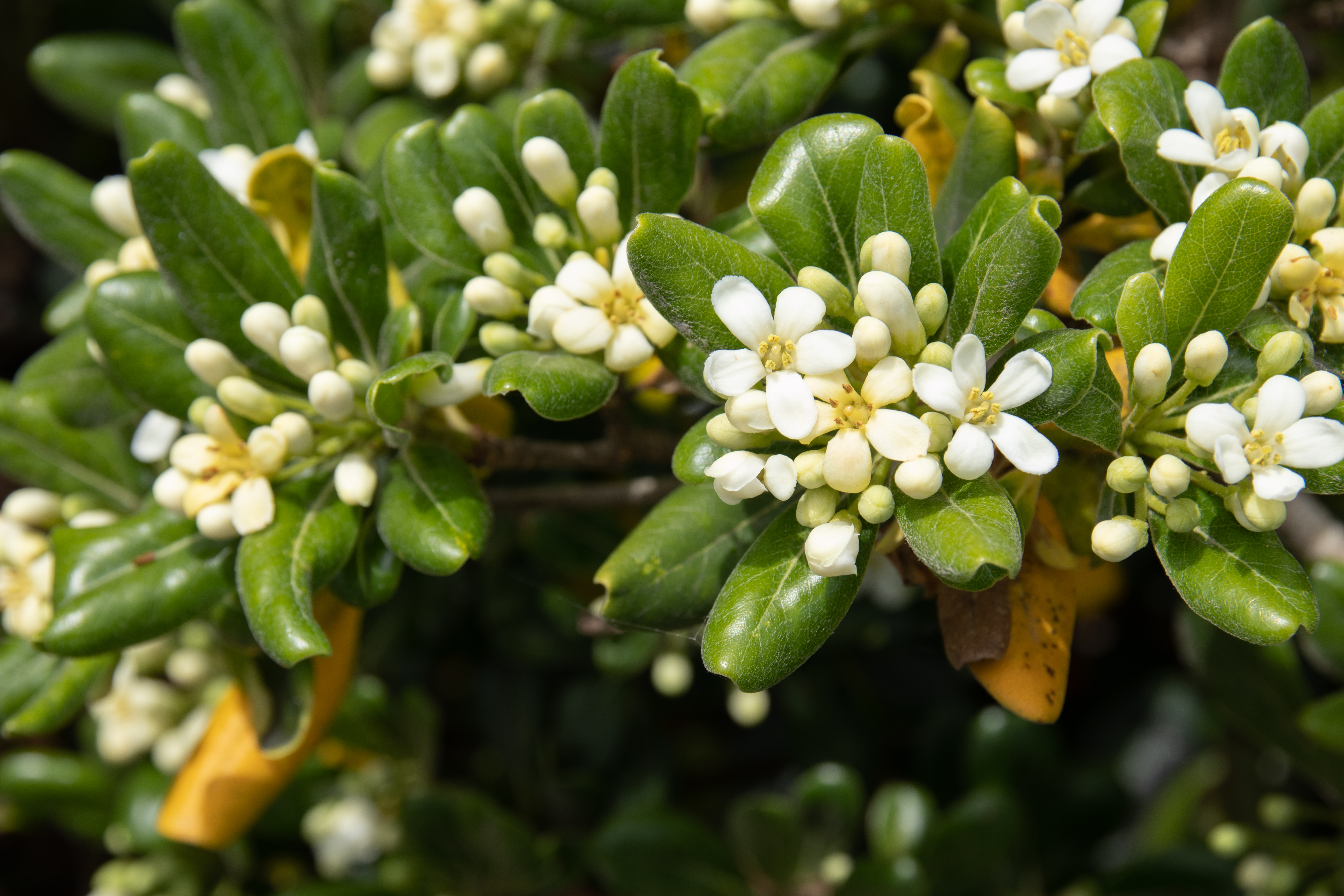 トベラ(学名：Pittosporum tobira) 撮影地：波崎海岸（茨城県神栖市）Canon EOS 80D + Sigma 17-70mm F2.8-4 DC Macro OS HSM